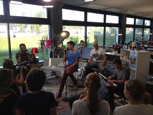 Seven performt bei "The Joiz Of Switzerland"